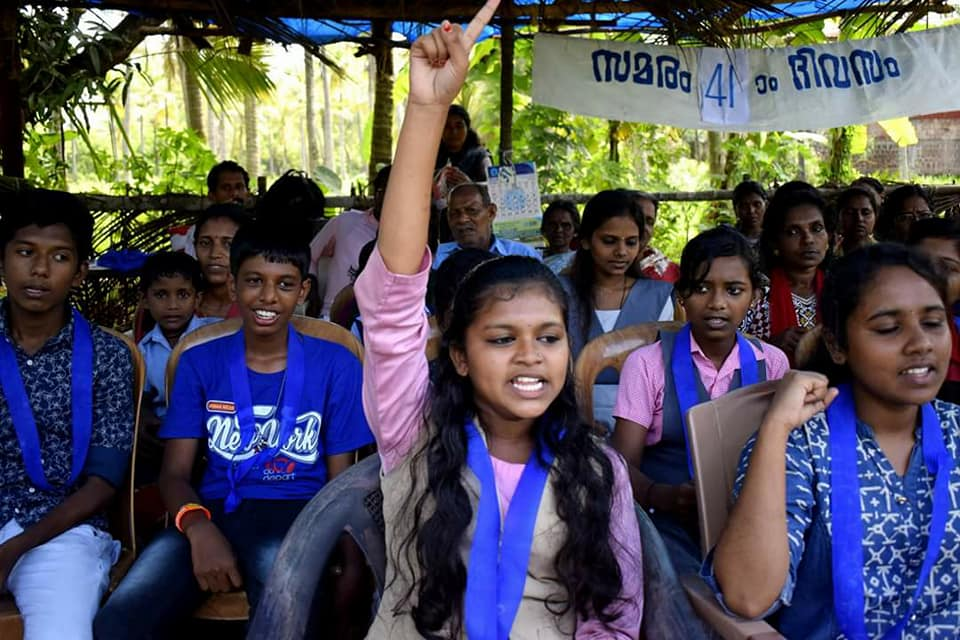 തുരുത്തി സമരത്തിന്റെ ഭാഗമായി വിദ്യാർത്ഥികൾ നടത്തിയ നിരാഹാരസമരം